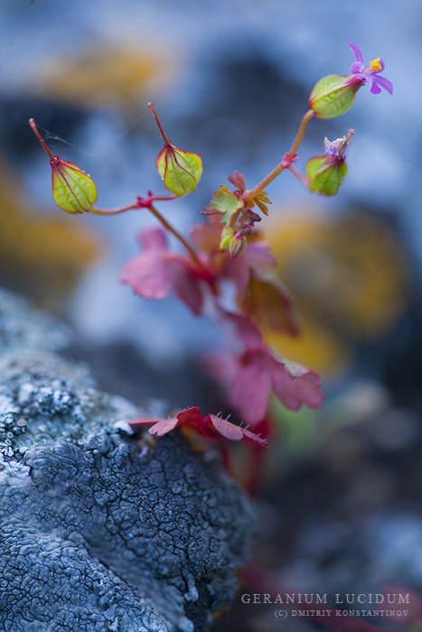 Герань блестящая